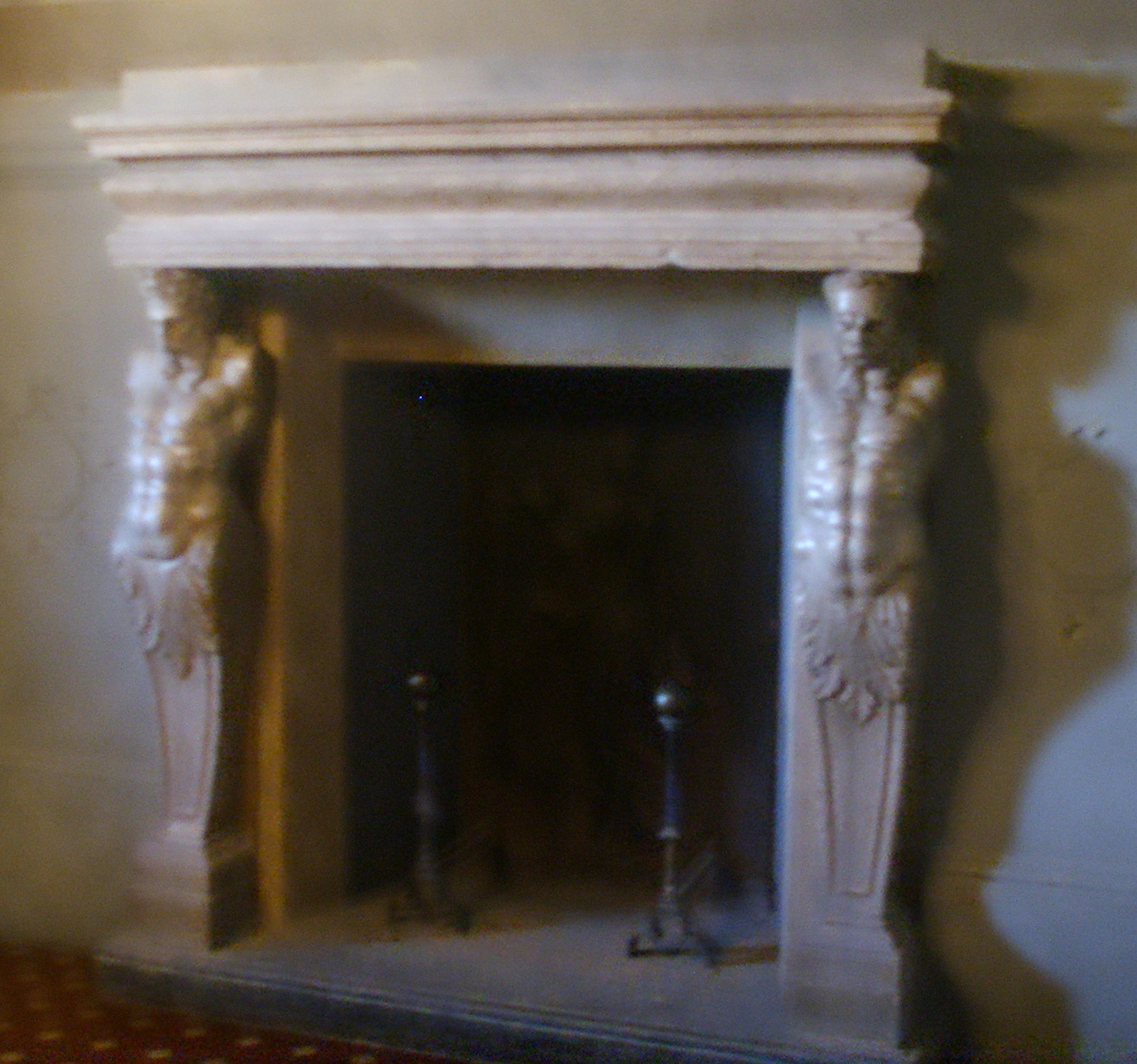 Villa medicea di Poggio a Caiano, inside Bianca Cappello Apartments in Poggio a Caiano, Italy